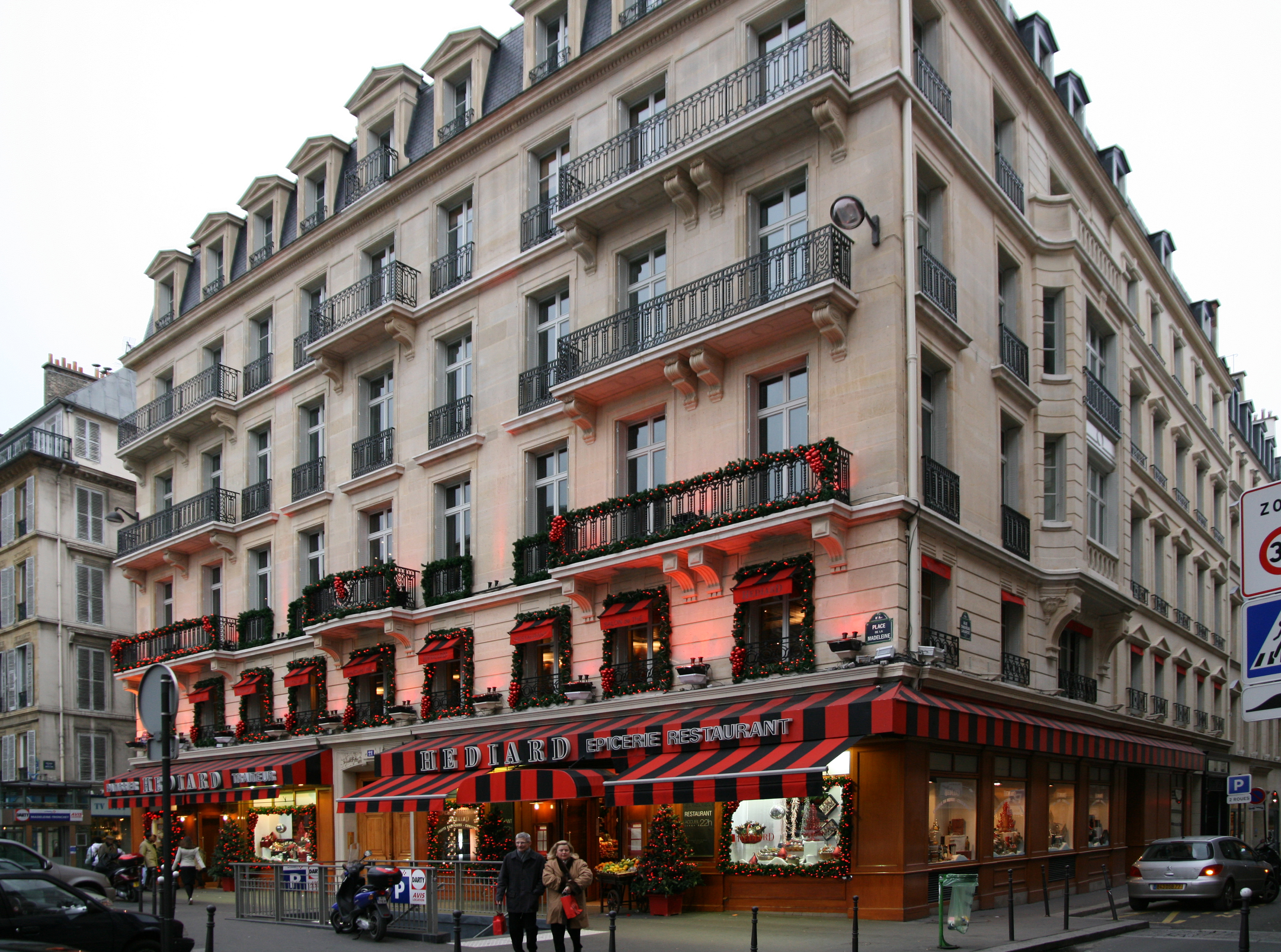 Hediard Store, Place de la Madeleine, Paris.